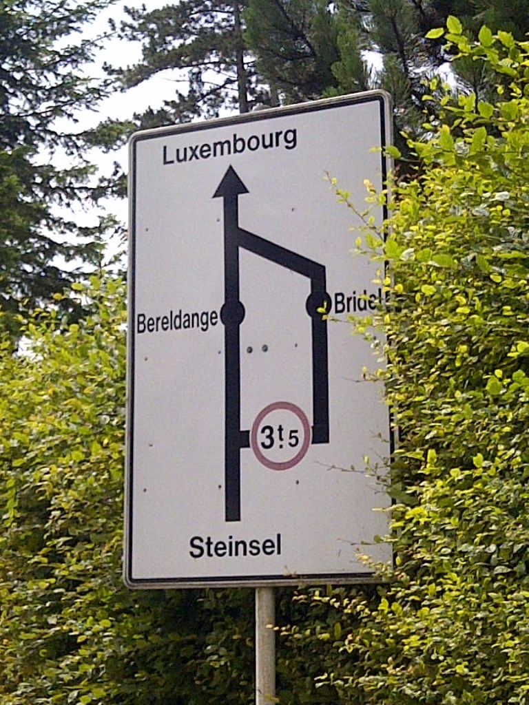 Signal routier E,22c du Code de la Route luxembourgeois.